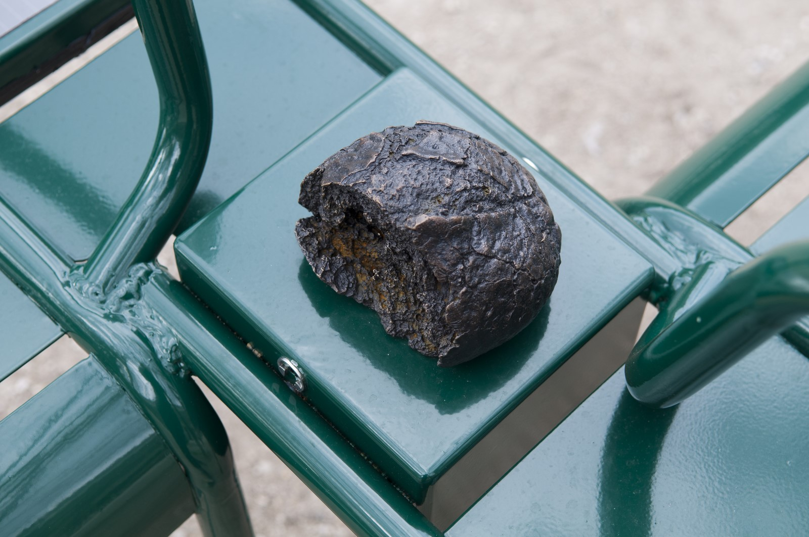 bronze : pain